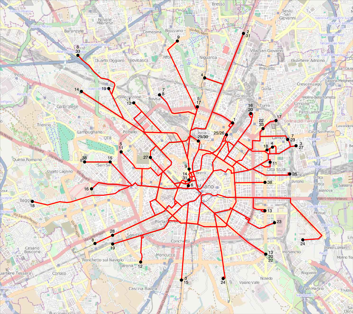 Mappa della rete tranviaria urbana di Milano al 9 novembre 1964.